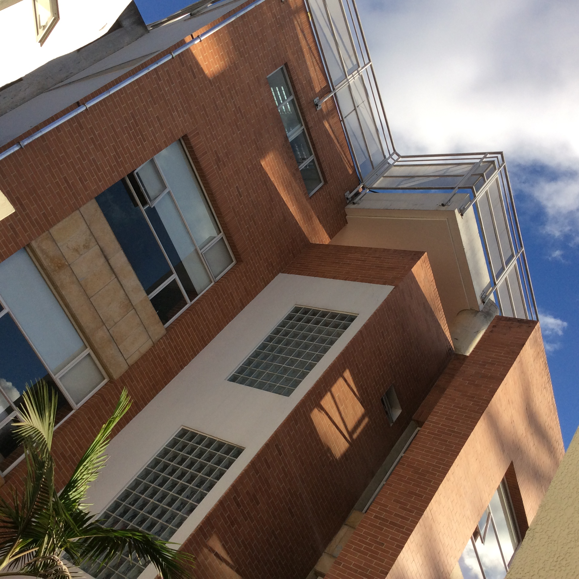 Unipanamericana Fundación Universitaria